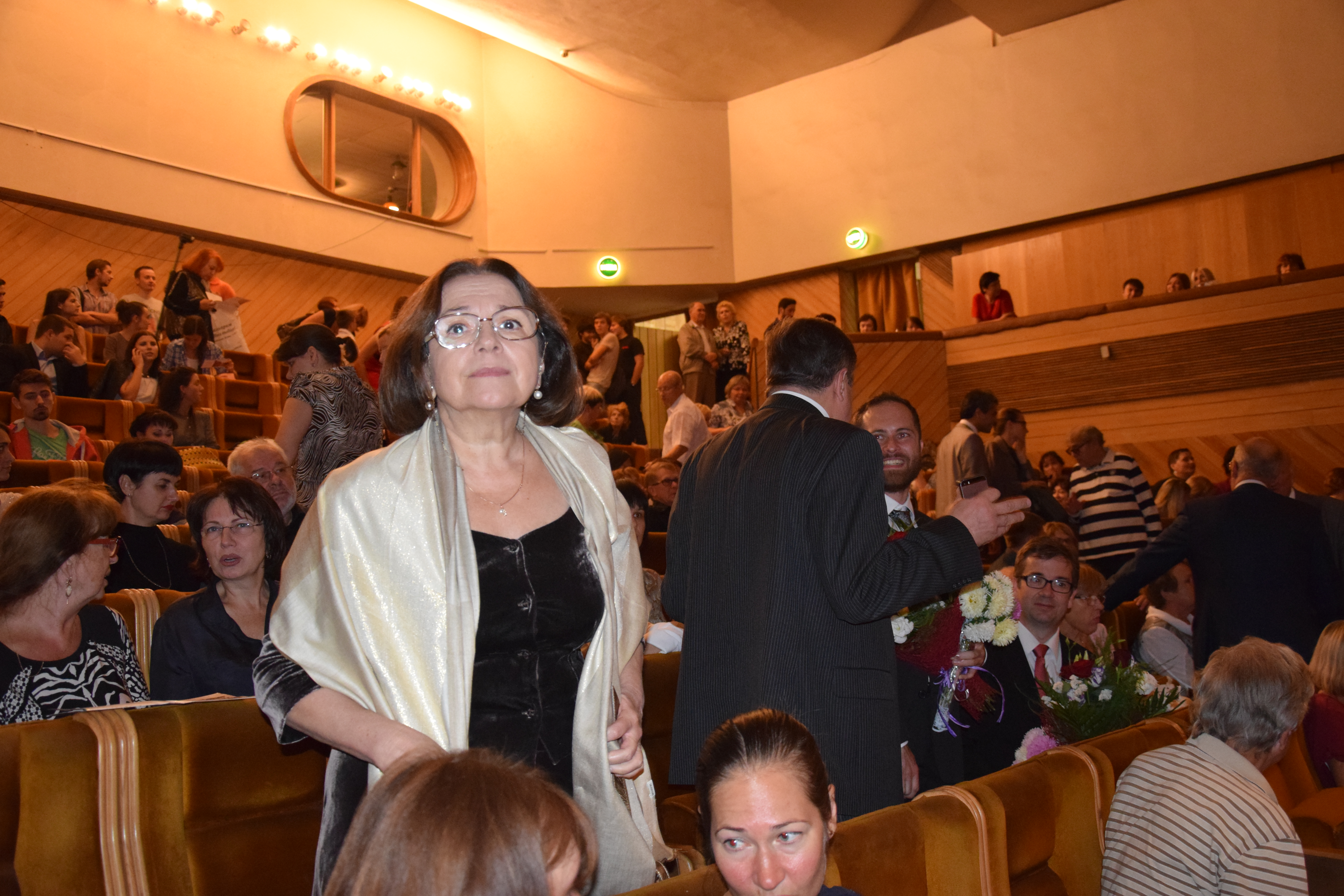 Пианистка Татьяна Веркина на открытии Международного музыкального фестиваля "Харьковские ассамблеи-2015"